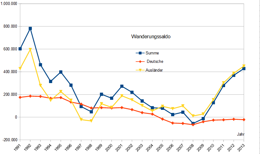 Wanderungssaldo